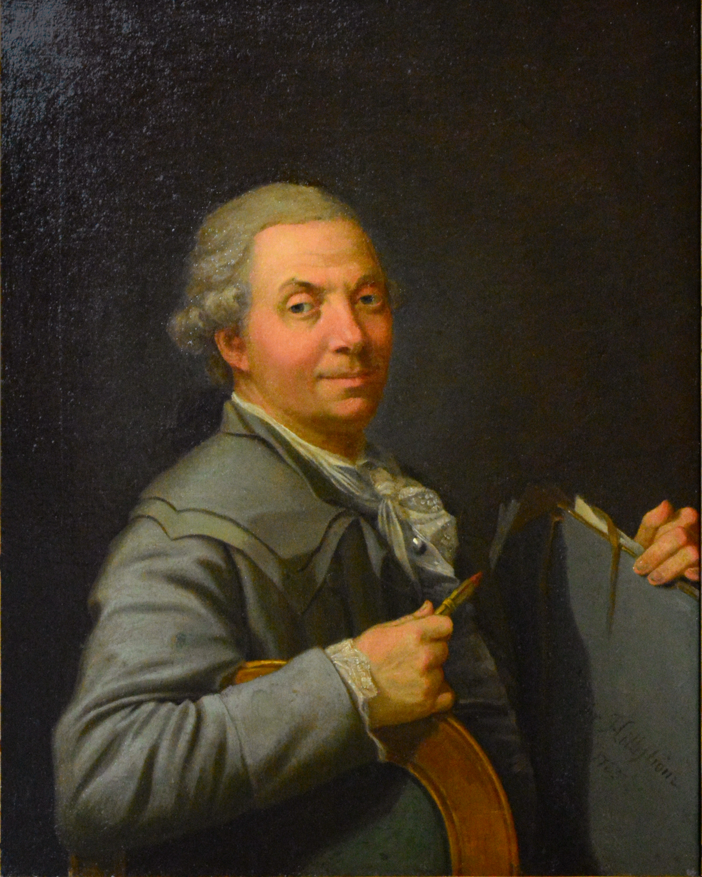 Self-portrait